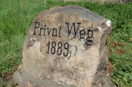 Zabytkowy drogowskaz we wsi Henryków gm. Szprotawa